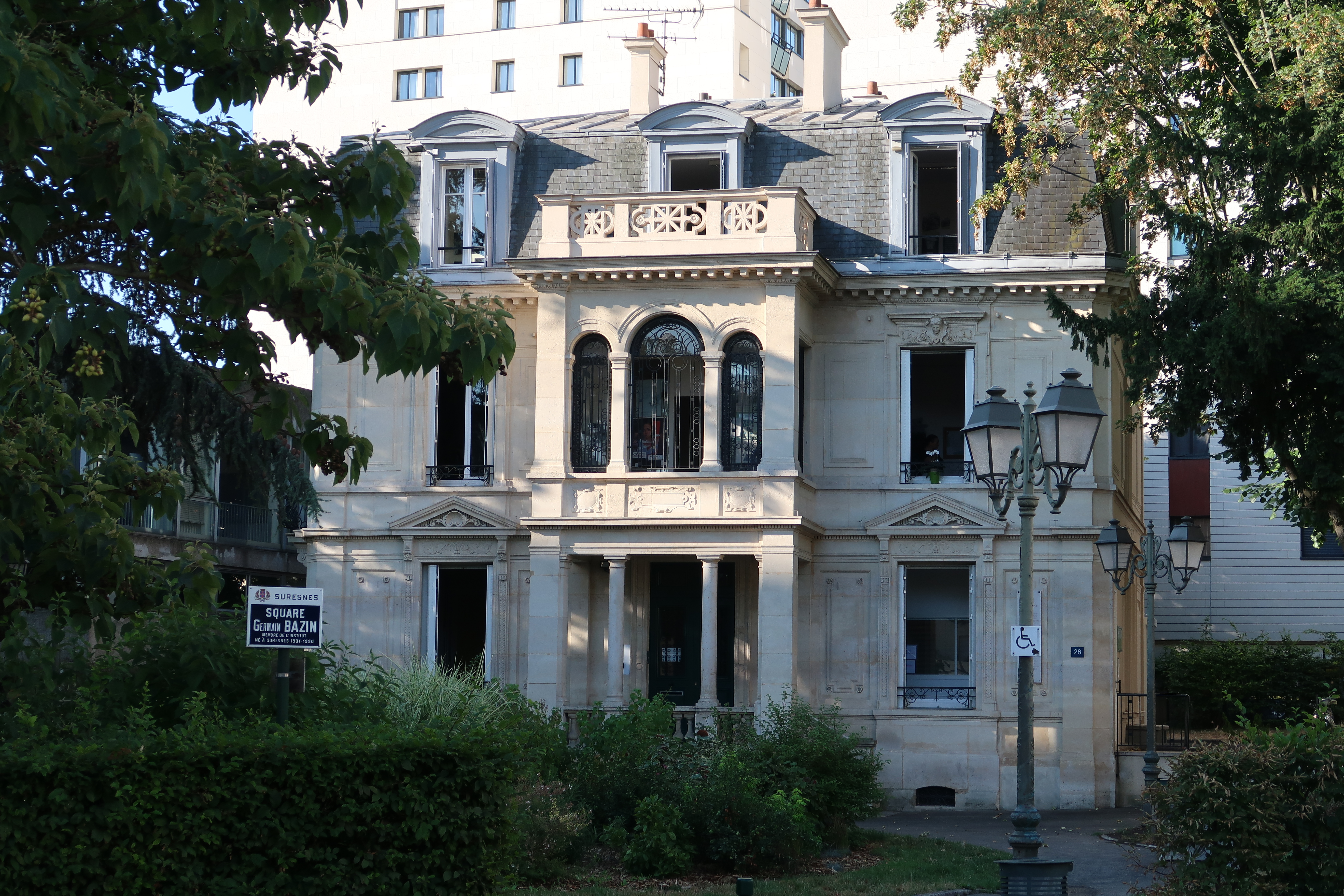 Maison dite château de la Grève située au n°28 rue Merlin de Thionville à Suresnes (Hauts-de-Seine).